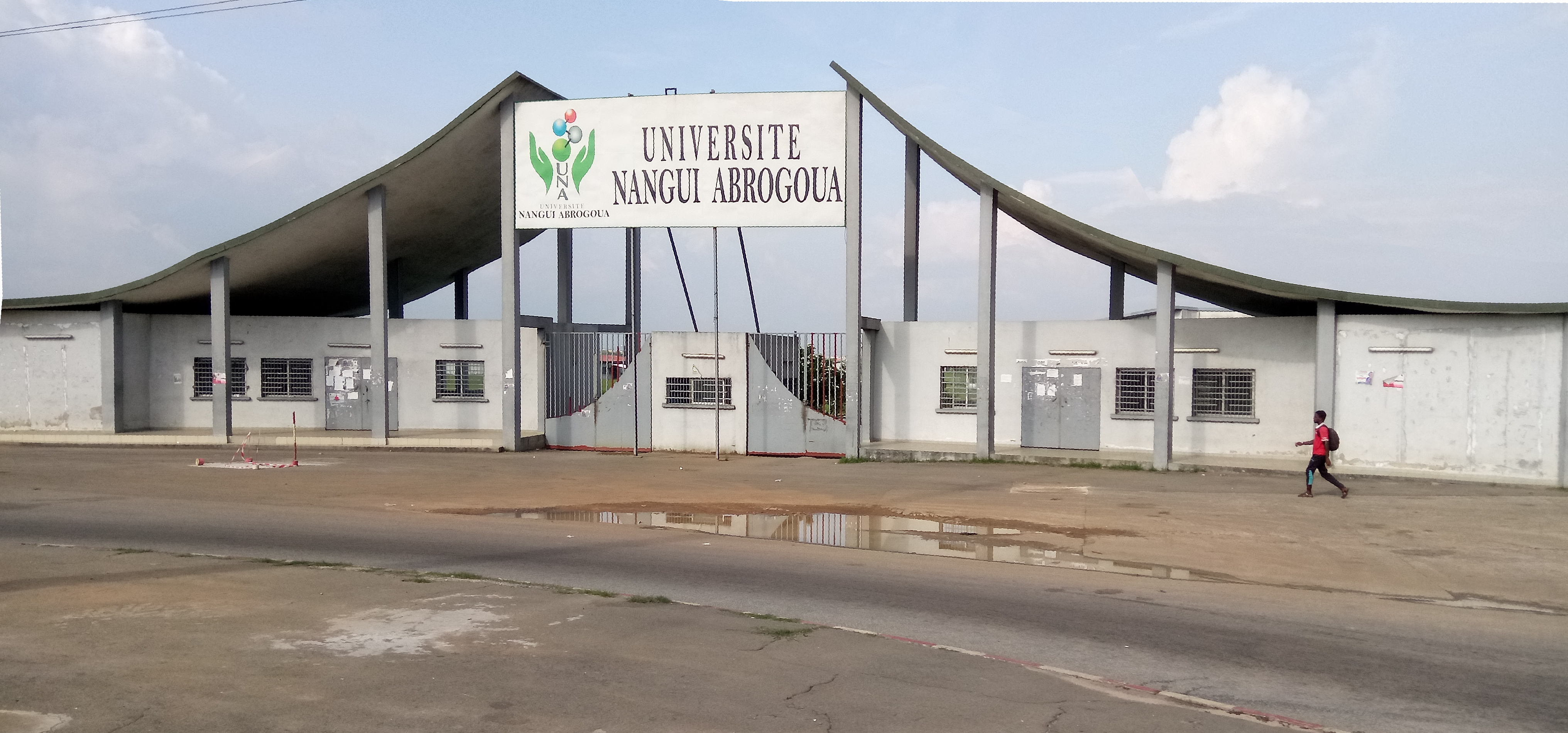 portail